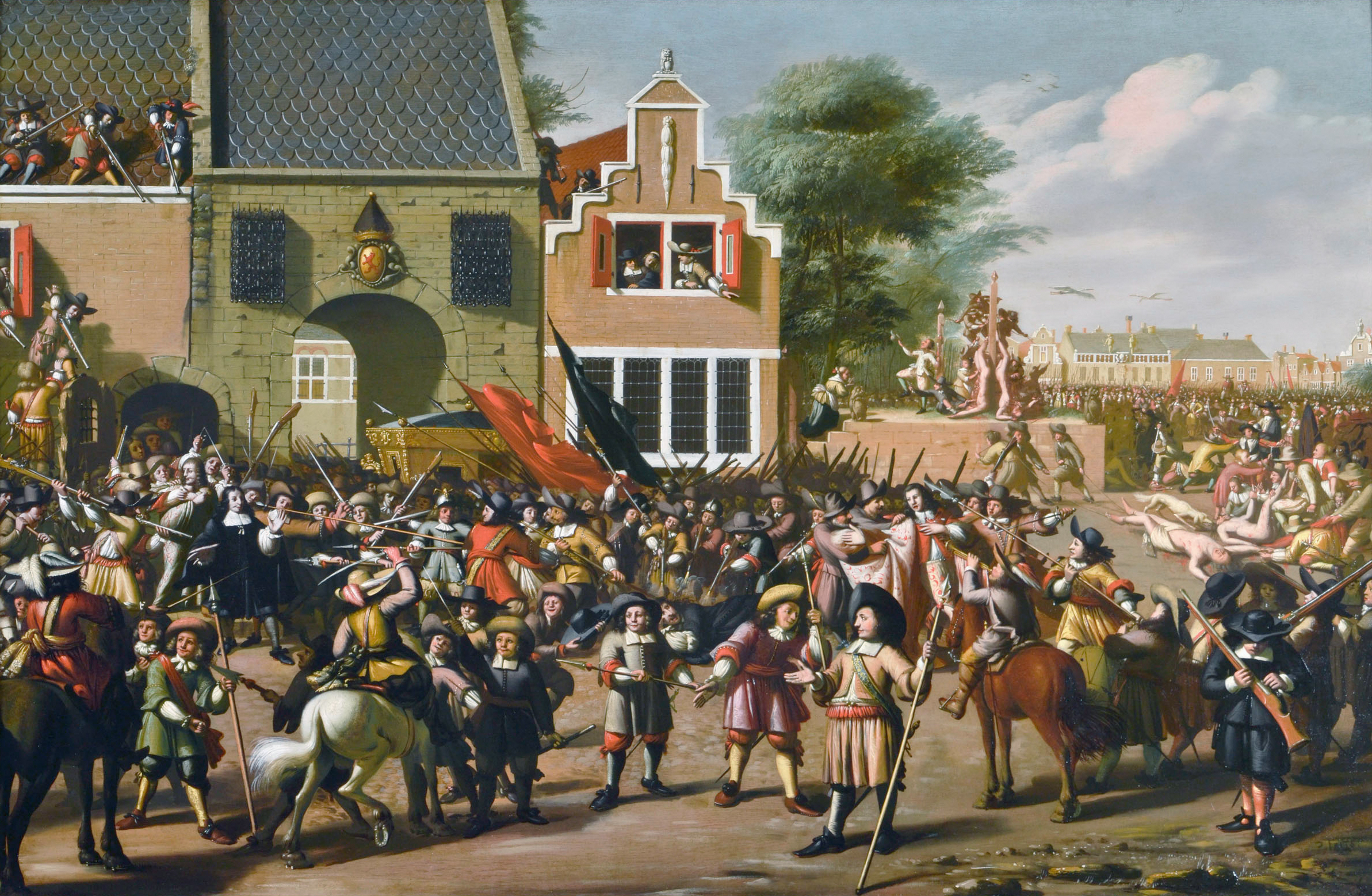 20 augustus 1672, de moord op de gebroeders De Witt Het schilderij laat als in een stripverhaal zien hoe Johan de Witt, gekleed in deftig zwart pak, en Cornelis de Witt, in Japanse mantel, aan hun einde kwamen. Haags Historisch Museum.